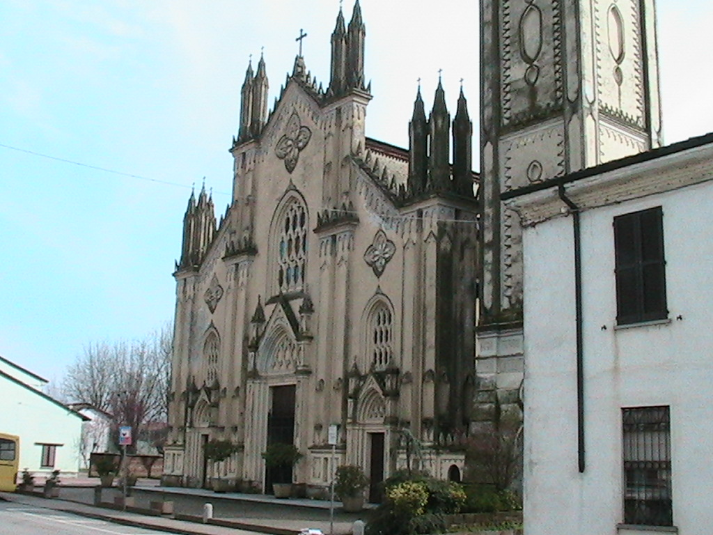 Cingia de' Botti - Chiesa parrocchiale di San Pietro